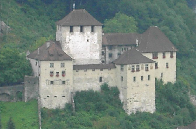 selbst GNU-FDL